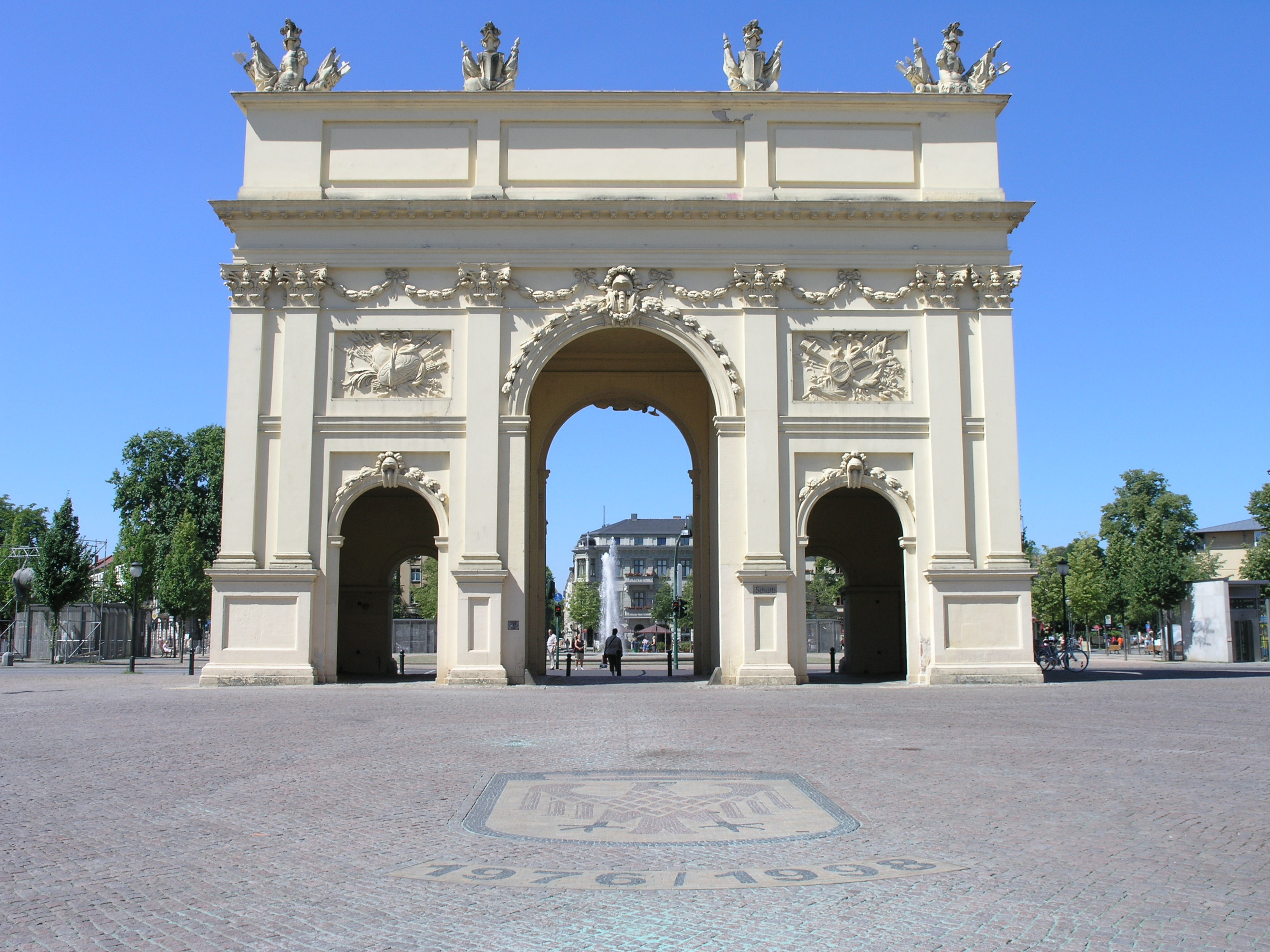 Potsdam - Brandenburger Tor - 2006